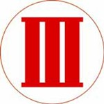 QLVNCH